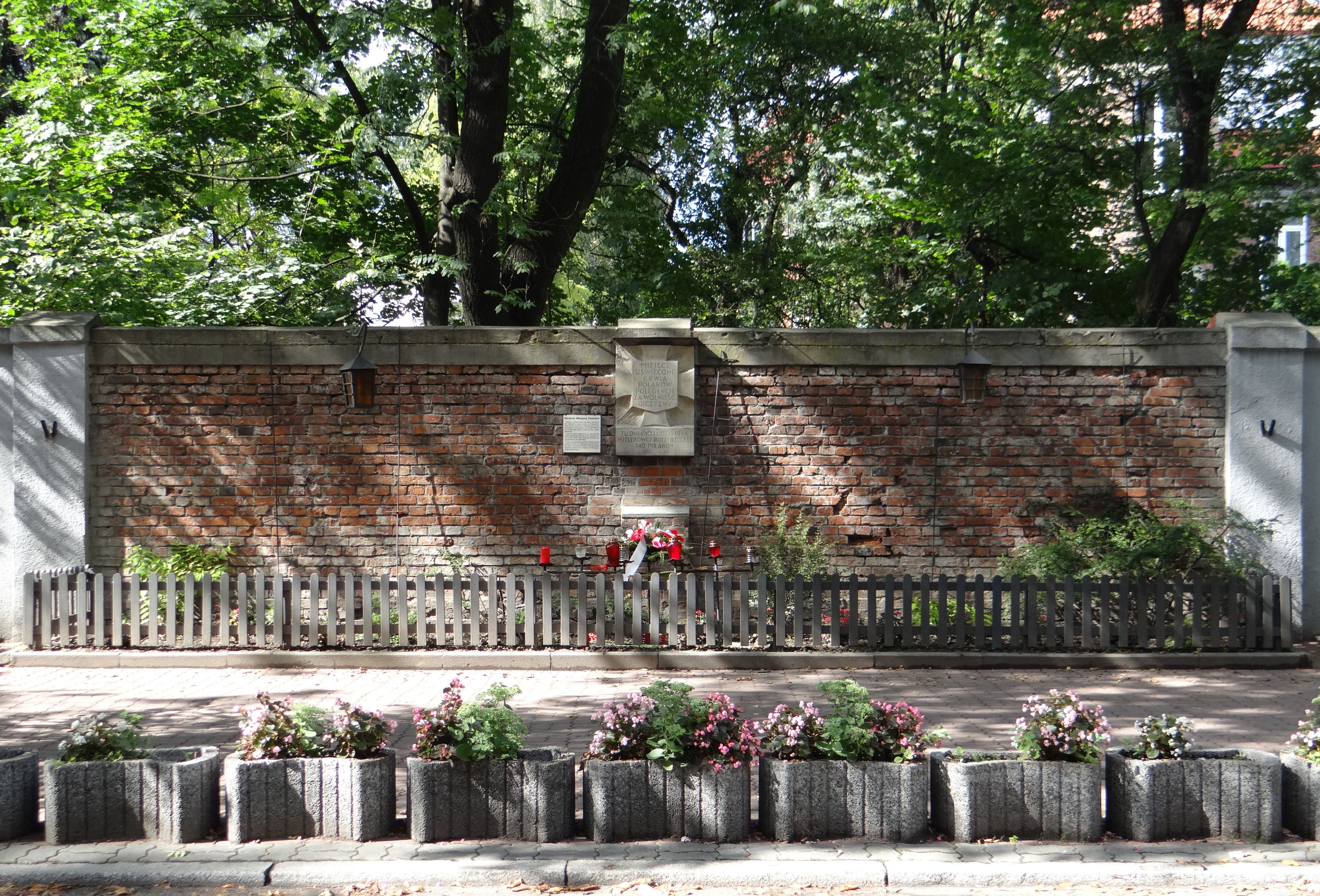 Mur ogrodzenia na ulicy Barskiej 4 stał się 10 lutego 1944 roku niemym świadkiem kaźni 140 Polaków zabitych w odwecie przez Niemców za udany zamach AK na Kutscherę w alejach Ujazdowskich 1 lutego 1944